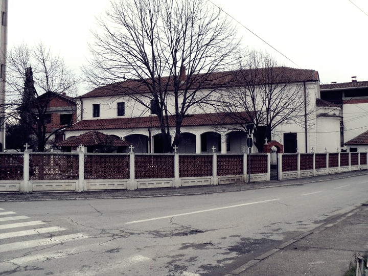 Sts. Cyril and Methodius Church (Gevgelija)